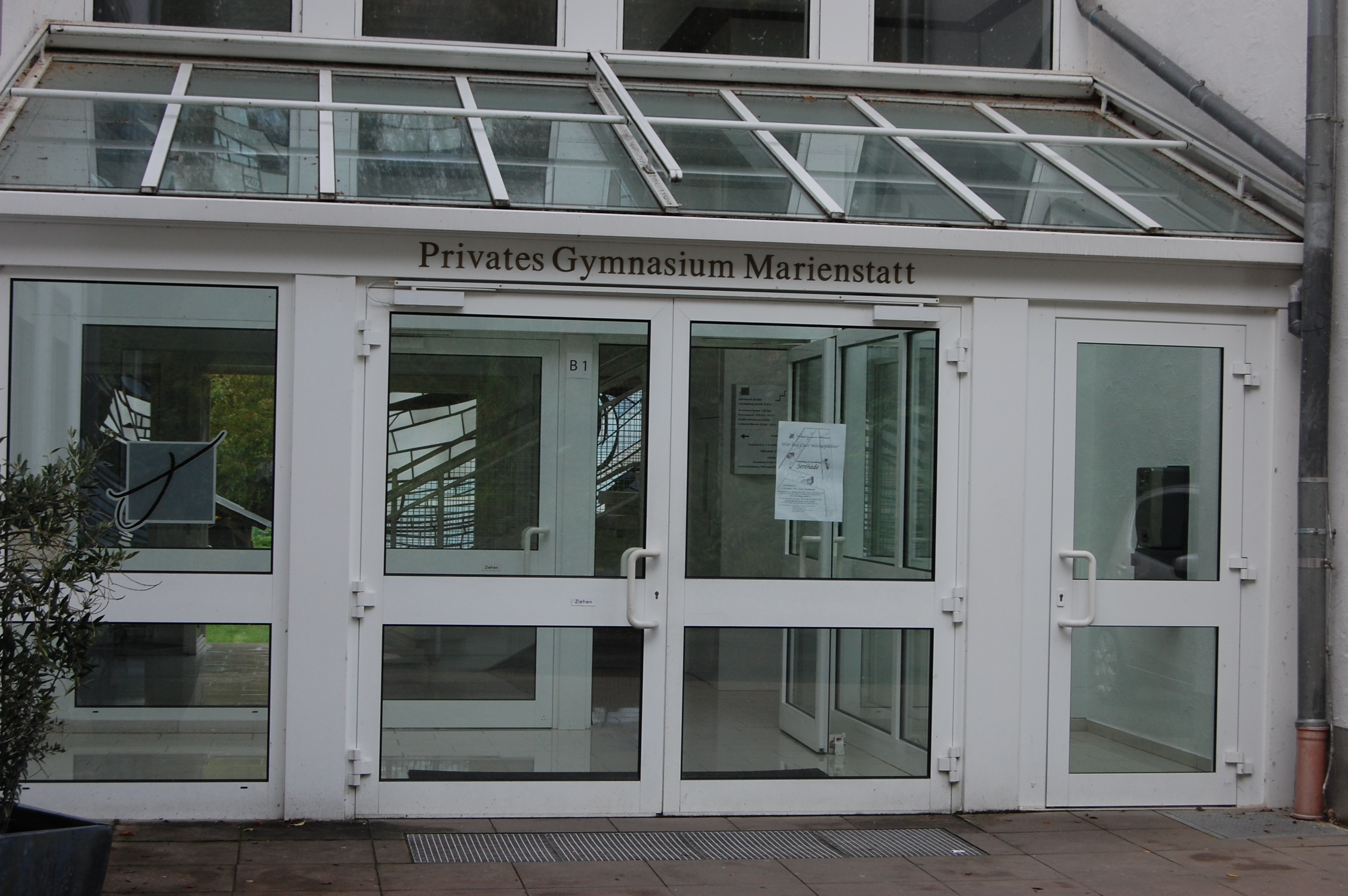 Gymnasium Marienstatt: Haupteingang; links ist auch das Logo der Schule zu sehen.